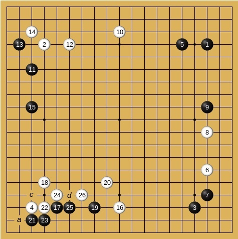 265手完白中押勝